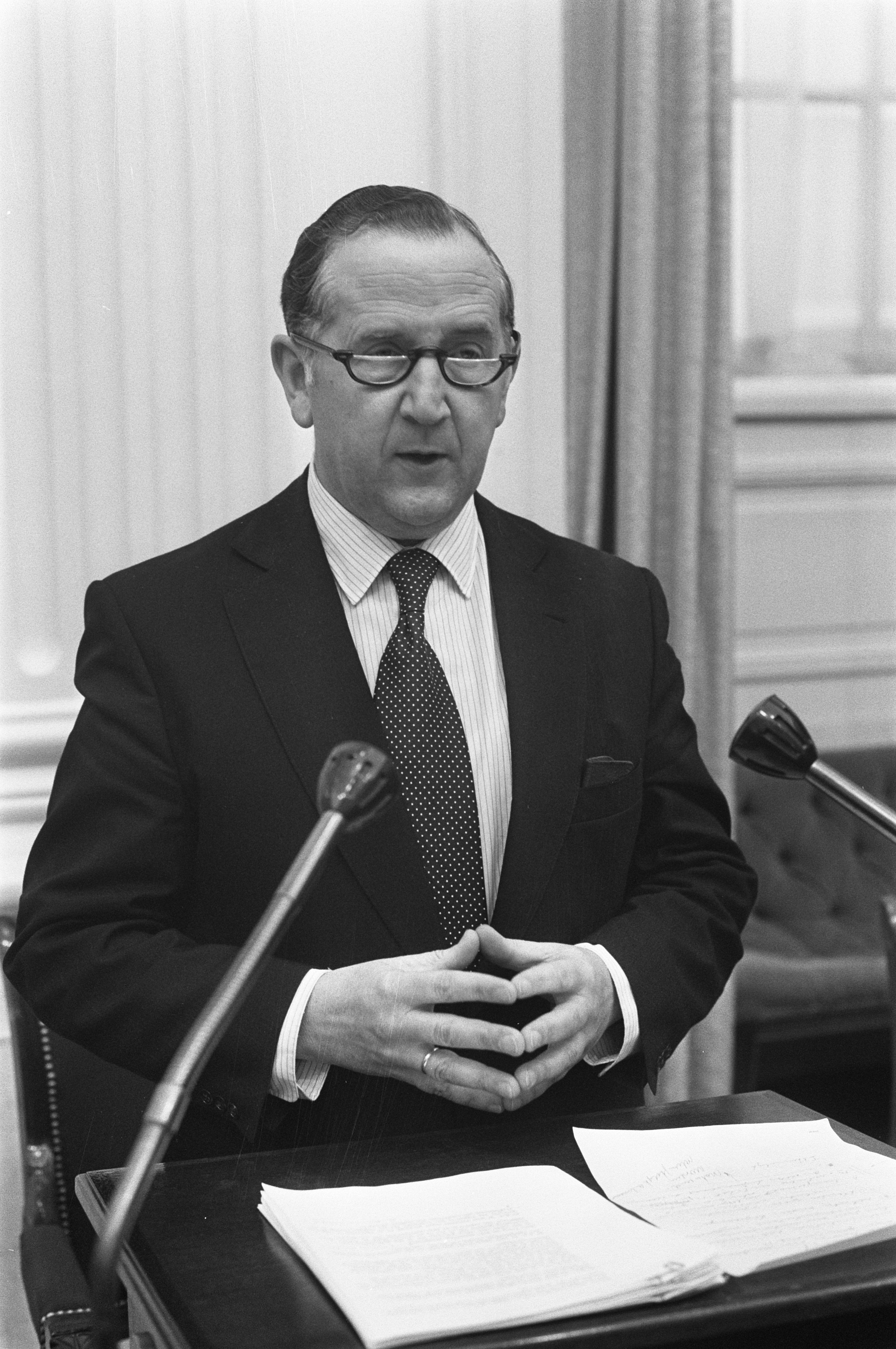 Collectie / Archief : Fotocollectie Anefo Reportage / Serie : [ onbekend ] Beschrijving : Tweede Kamer debat over schoolgeldverhoging en begroting van Defensie, Minister Van Veen Datum : 18 oktober 1972 Locatie : Den Haag, Zuid-Holland Trefwoorden : ministers, overheidsbegrotingen, parlementaire debatten, politiek Persoonsnaam : Veen, Chris van Fotograaf : Verhoeff, Bert / Anefo Auteursrechthebbende : Nationaal Archief Materiaalsoort : Negatief (zwart/wit) Nummer archiefinventaris : bekijk toegang 2.24.01.05 Bestanddeelnummer : 925-9610